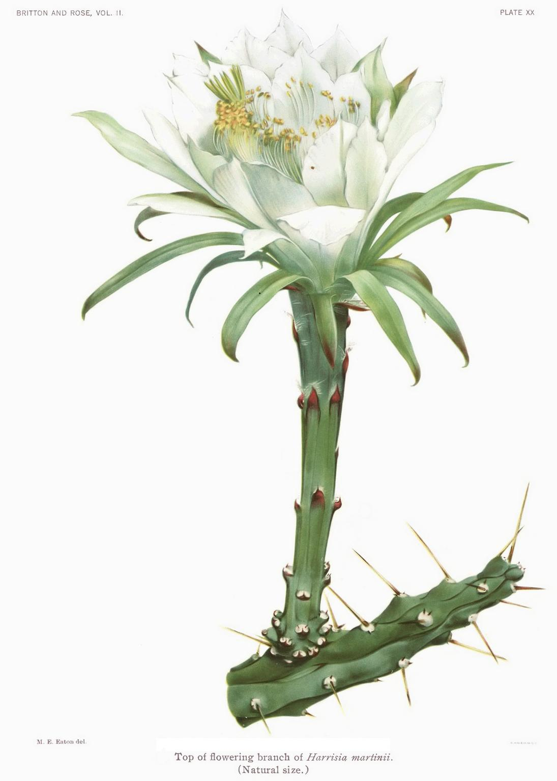 Harrisia martini